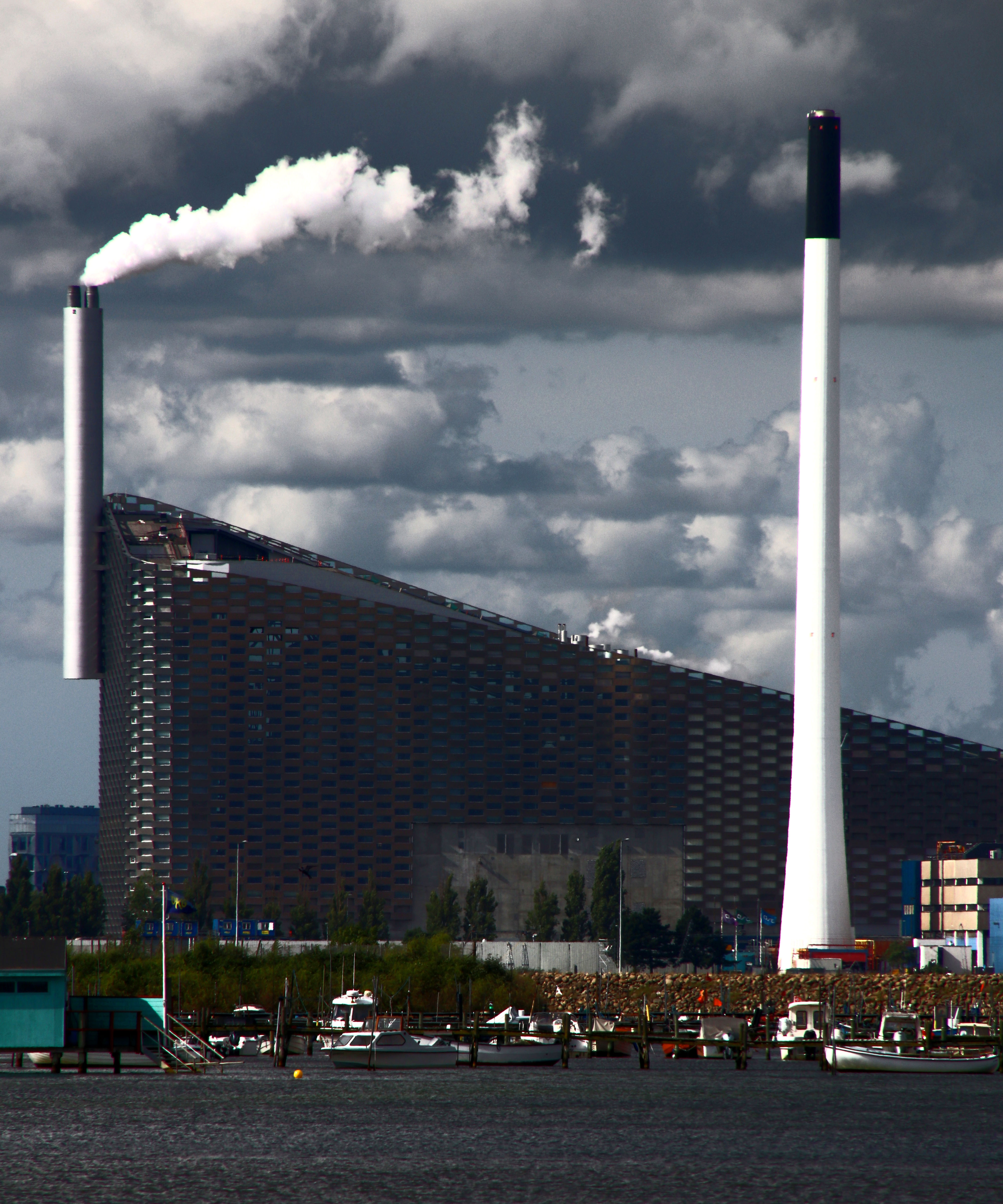 København / Copenhagen. Amager Bakke.